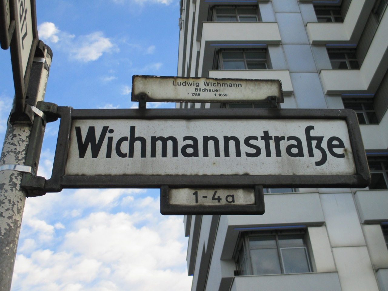 Berliner Straßenschild der Wichmannstraße mit Widmung